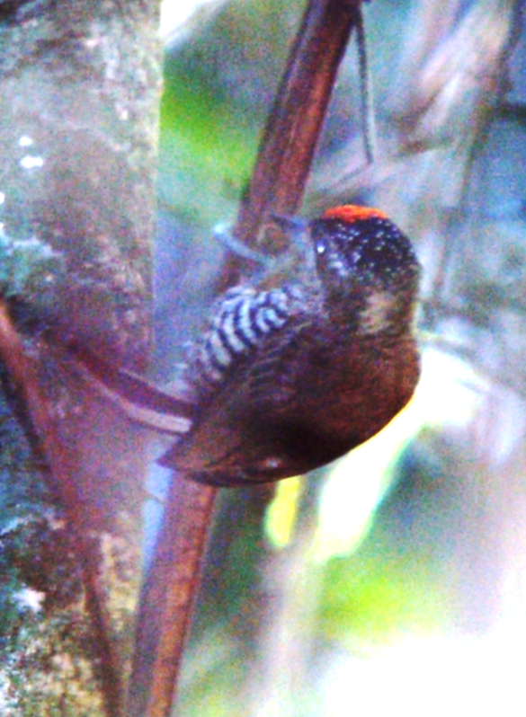 Brazilian bird, passaro brasileiro.